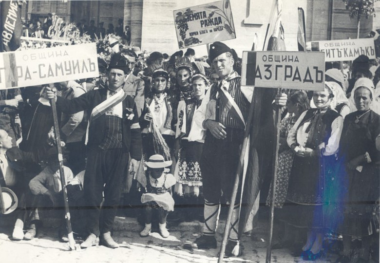 4-ти селскостопански културен и национален събор, 28 - 29 август 1938 г., гр. Варна. Групов портрет на участниците от гара Самуил и община Разград.